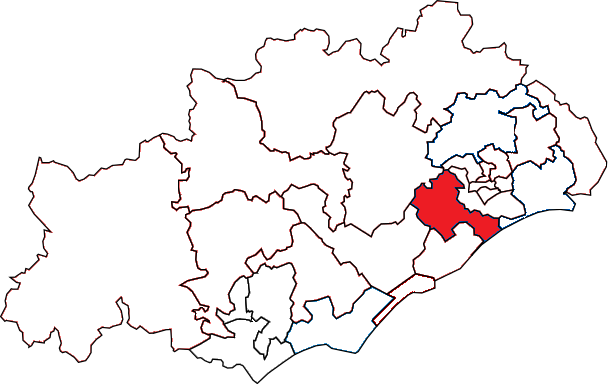 Situation du canton dans le département de l'Hérault